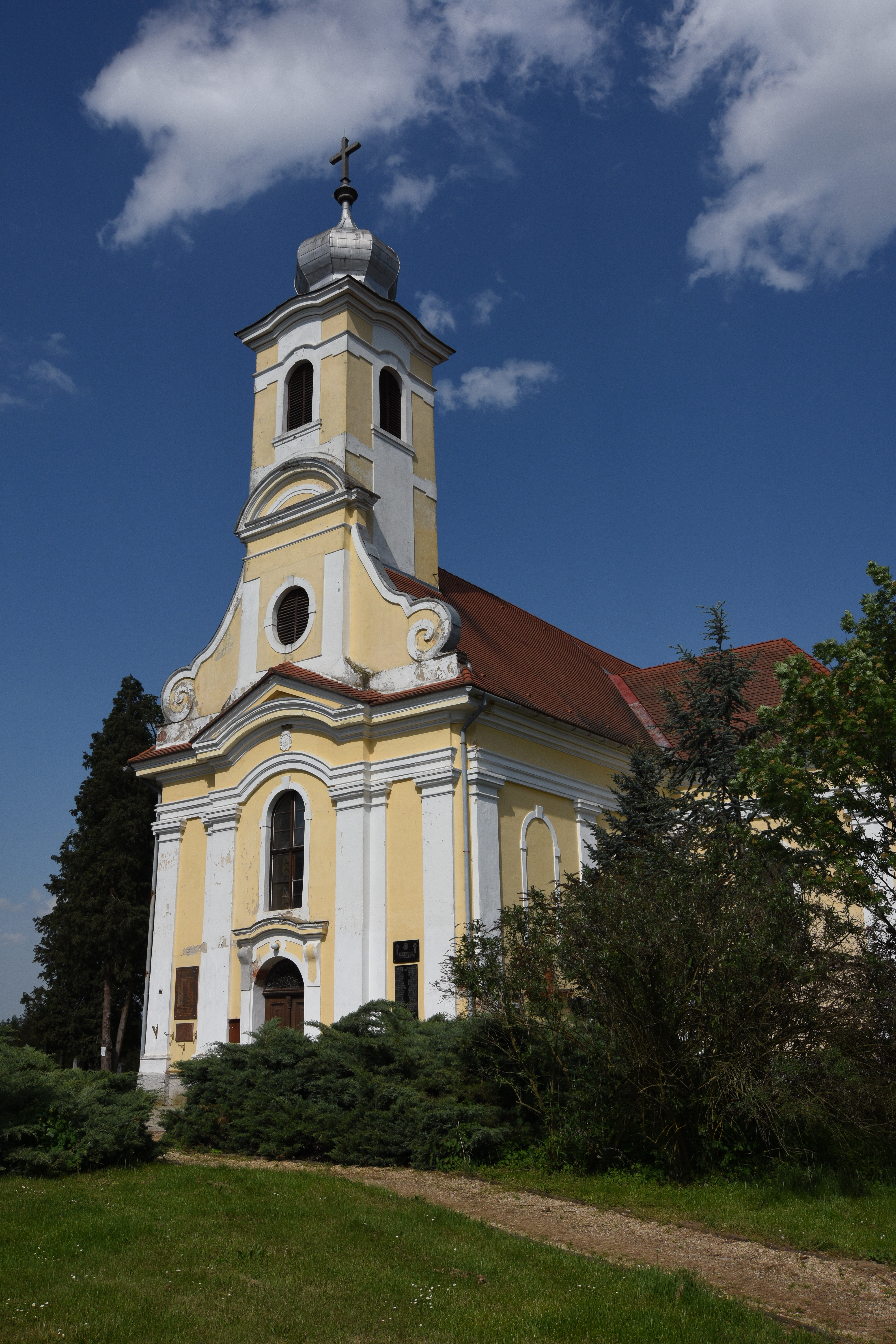 Roman Catholic Church in Csákánydoroszló